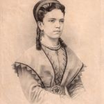 Agustina Gutiérrez Salazar, pintora y dibujante. Nació en 1851 en San Fernando, Chile. Murió en Santiago en Septiembre de 1886. Considerada como la primera mujer que ingresó a la Academia de Pintura en Chile en 1866, cuando contaba con quince años. Fue alumna de Alejandro Ciccarelli y en 1869, fue nombrada profesora de dibujo por el Supremo Gobierno, siendo una de las iniciadoras de la disciplina como enseñanza Oficial.